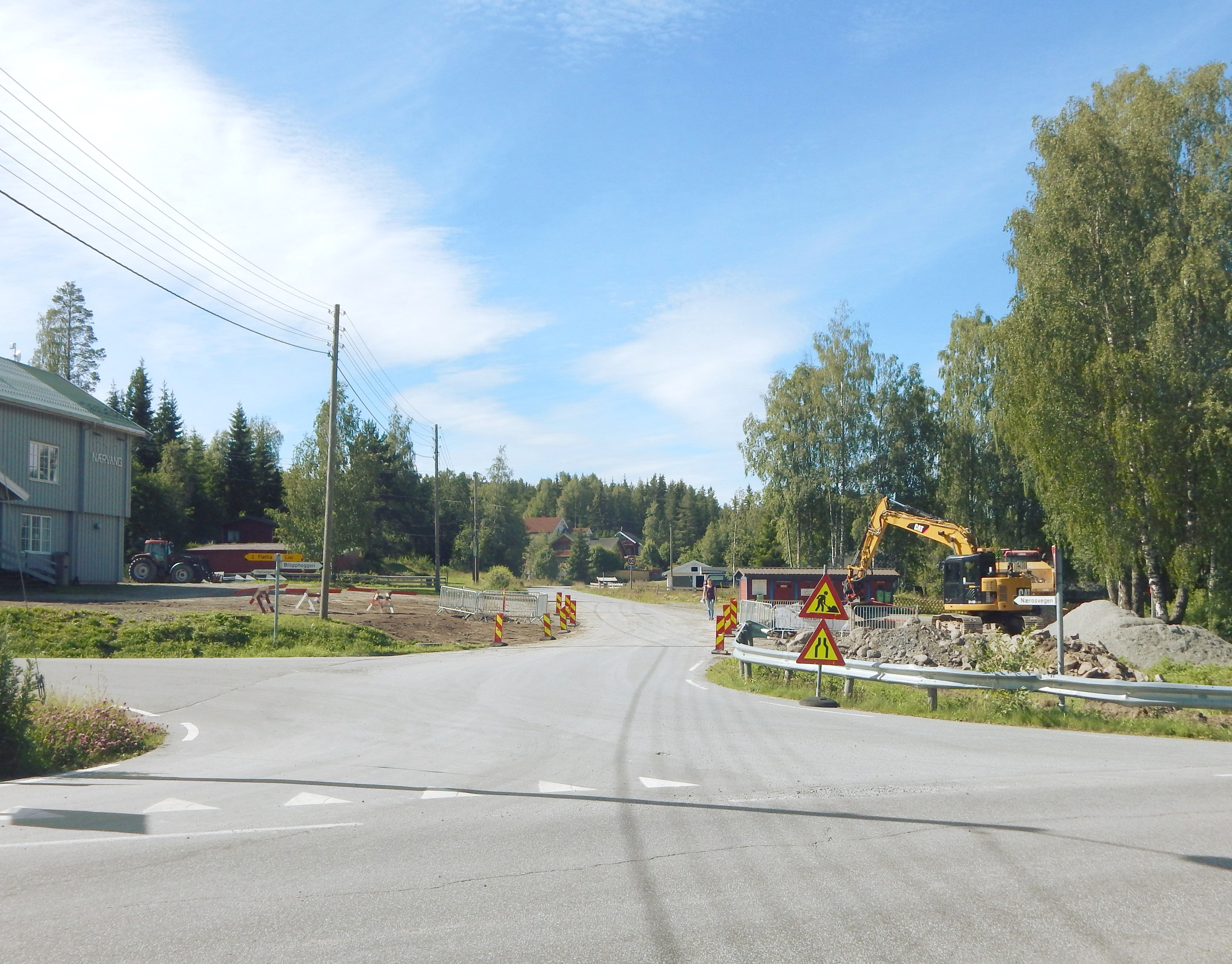 Nærosvegen sett fra Åsmarkvegen